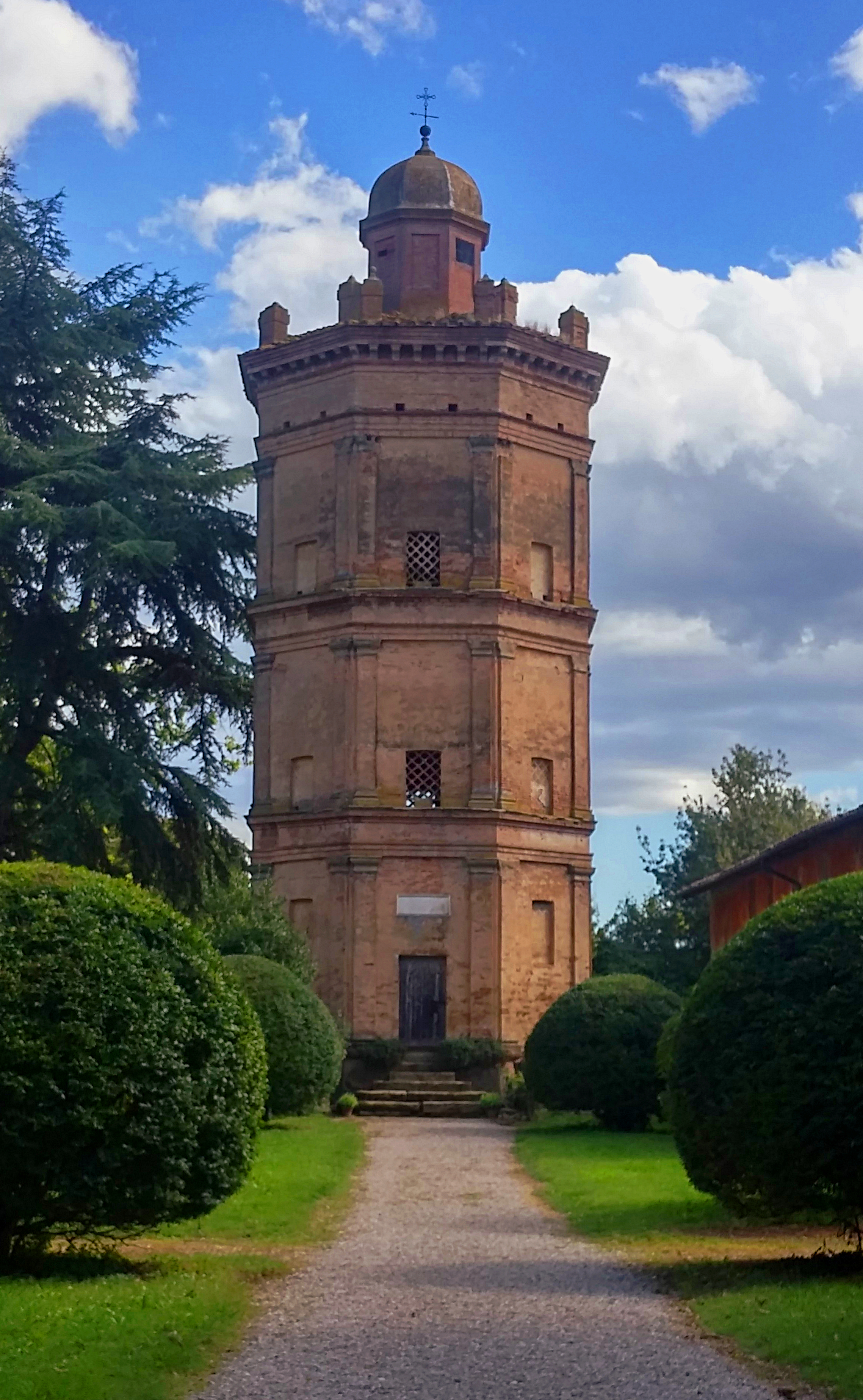 Colombaia del 1536 nel parco della Rocca Isolani a Minerbio, Bologna, italia This is a photo of a monument which is part of cultural heritage of Italy.